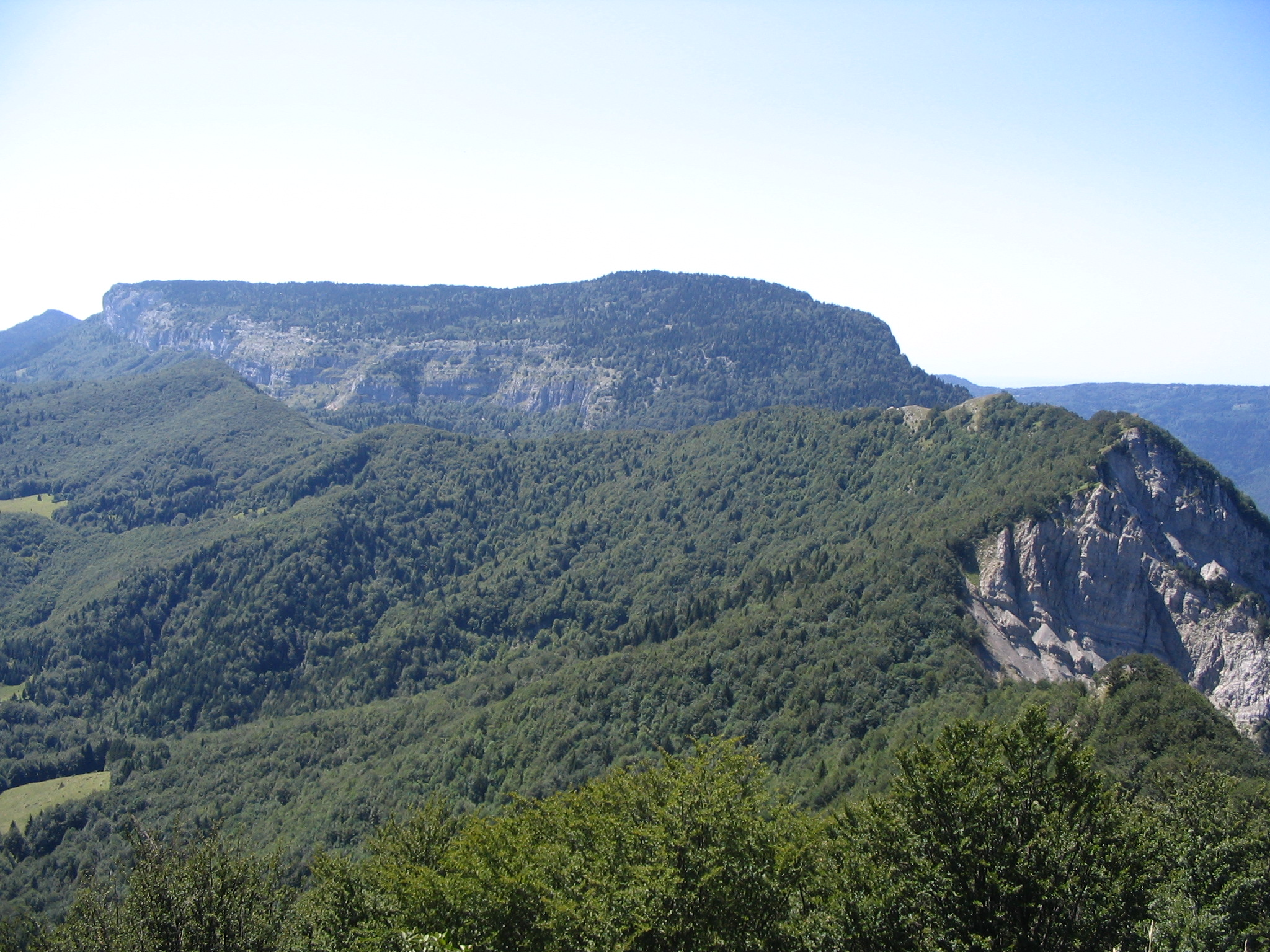 Mont Outheran (1676 m) depuis la Pointe de la Gorgeat (1486 m) - Entremont-le-Vieux - Savoie - Parc de la Chartreuse.